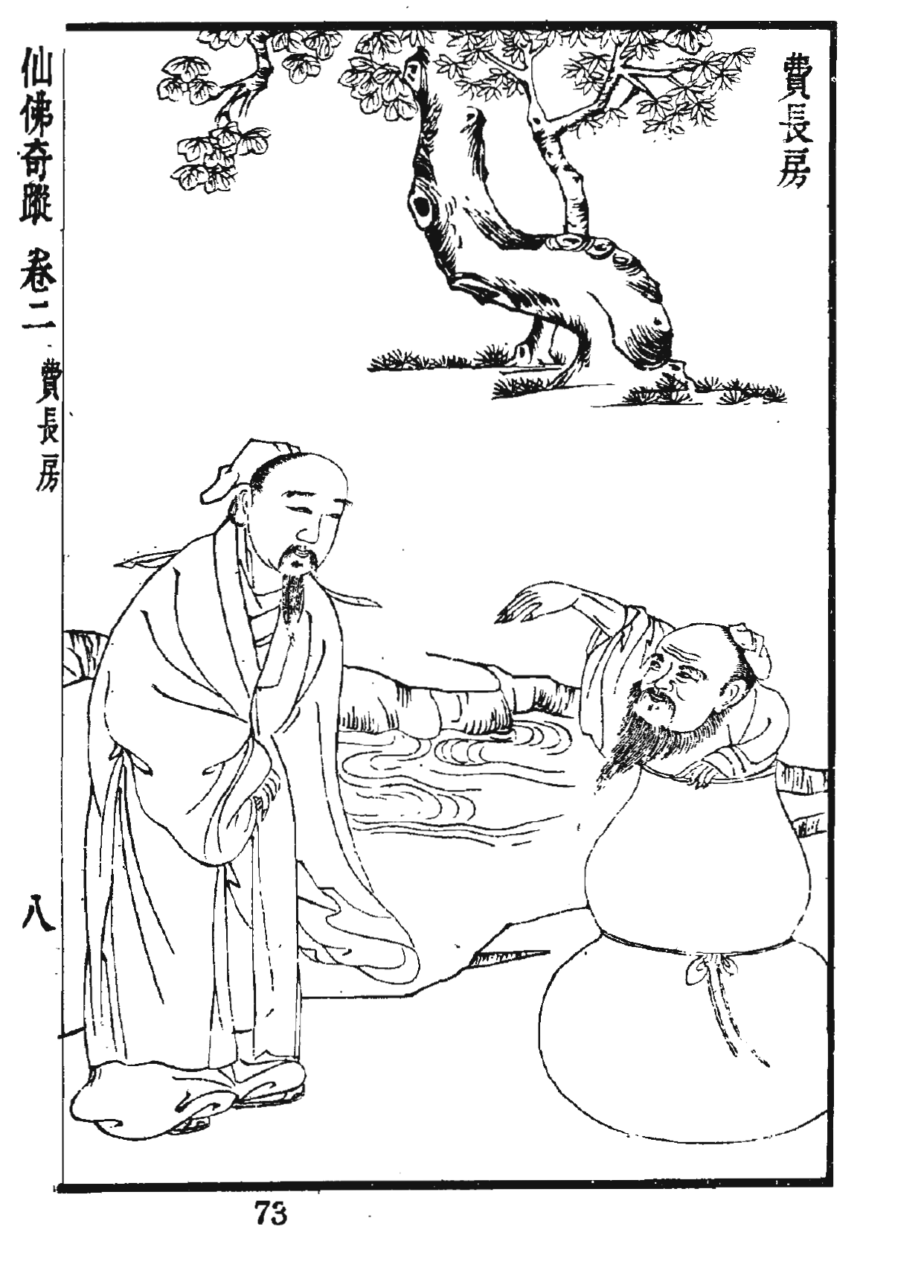 仙佛奇蹤插圖